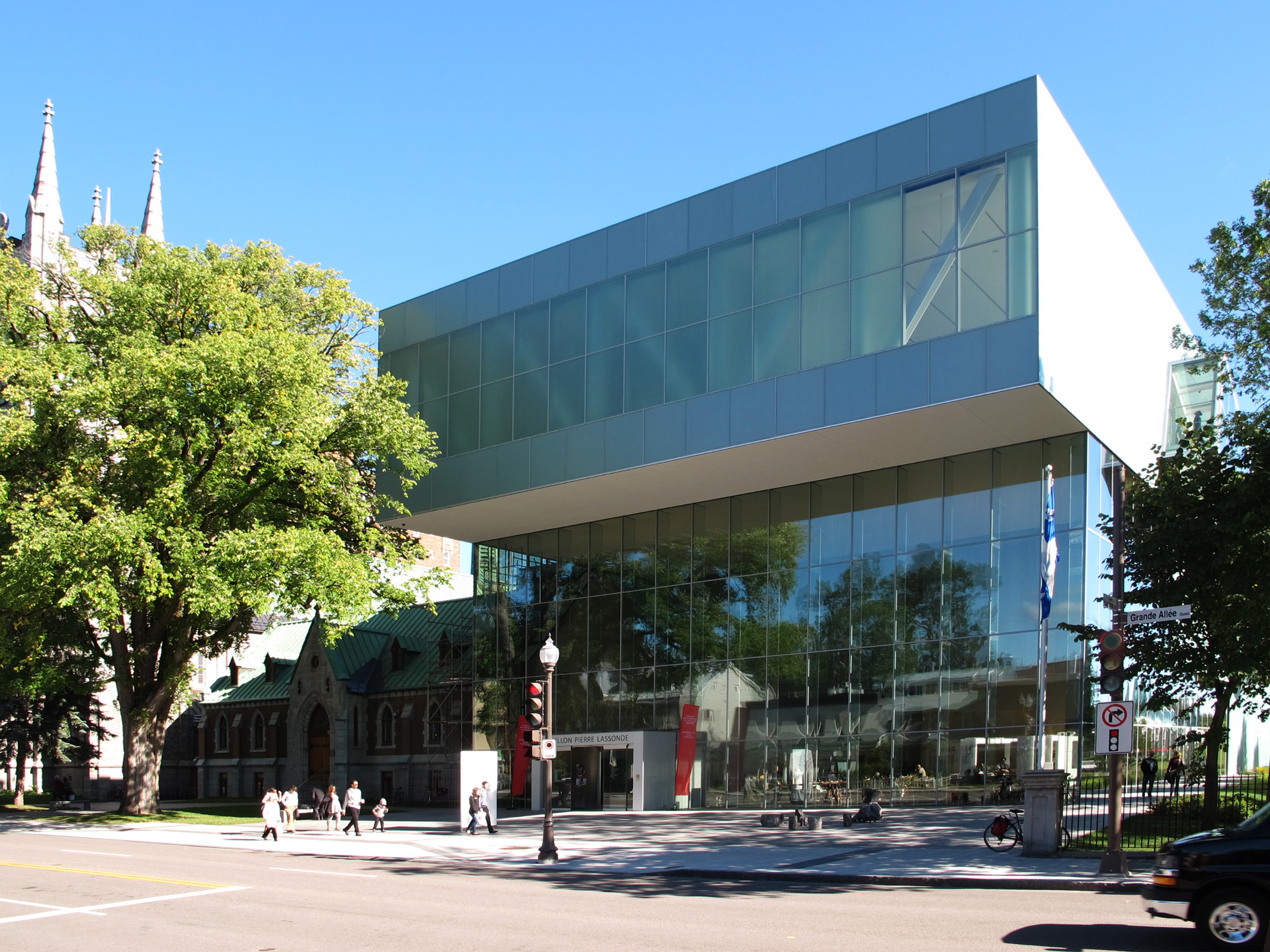 Pavillon Pierre Lassonde Musée national des beaux-arts du Québec (MNBAQ) Parc des Champs-de-Bataille Québec (Québec) Canada